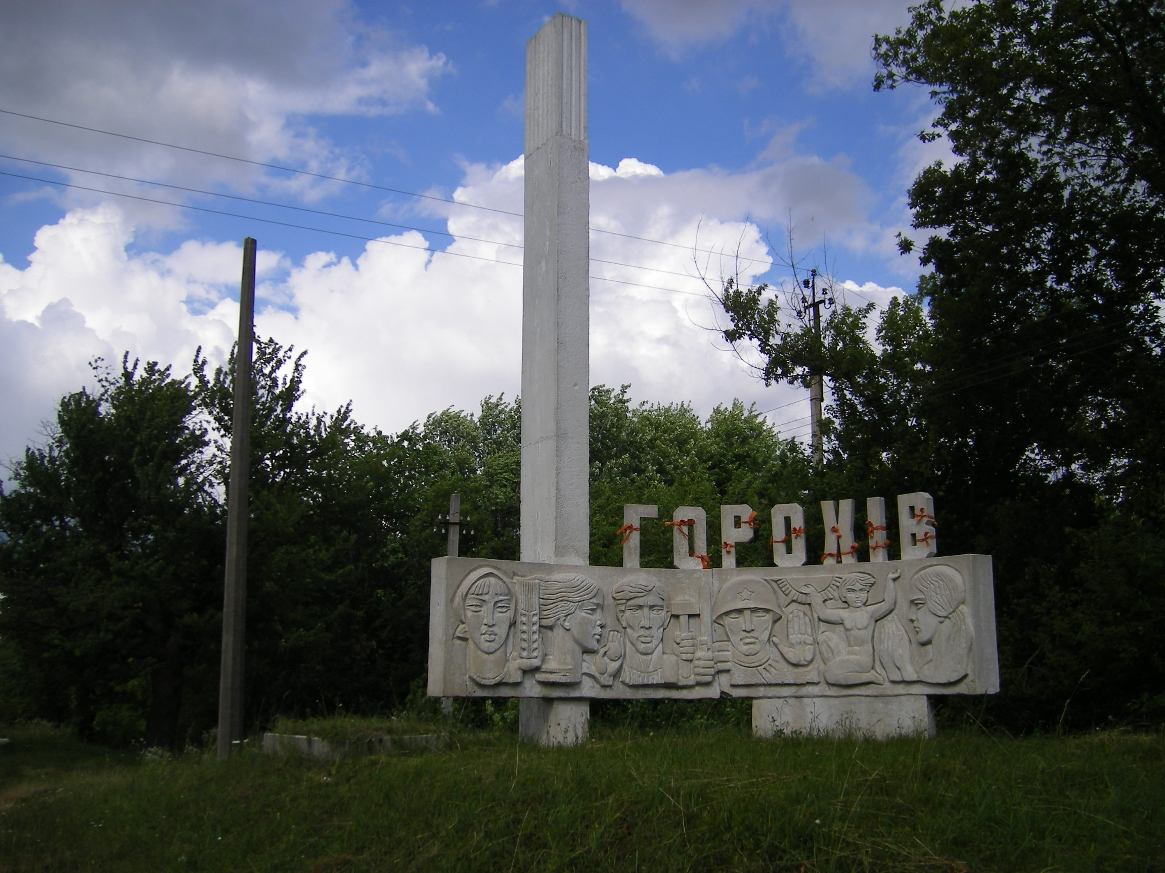 Horokhiv, Volynska Oblast